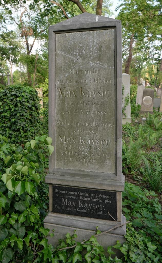 Grab des Redakteurs und sozialdemokratischen Politikers Max Kayser (1853-1888) auf dem Alten Jüdischen Friedhof in Breslau